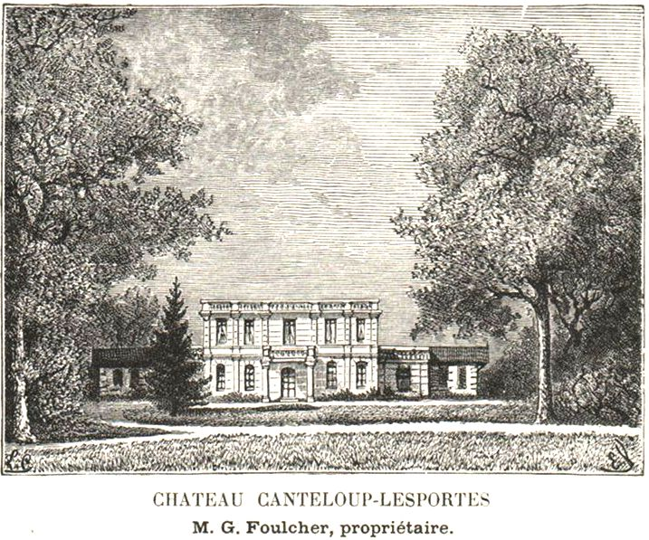 gravure sur cuivre